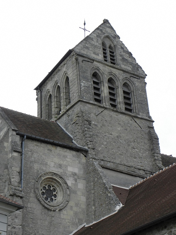 Clocher de l'église Saint-Martin de Montreuil-aux-Lions (02).